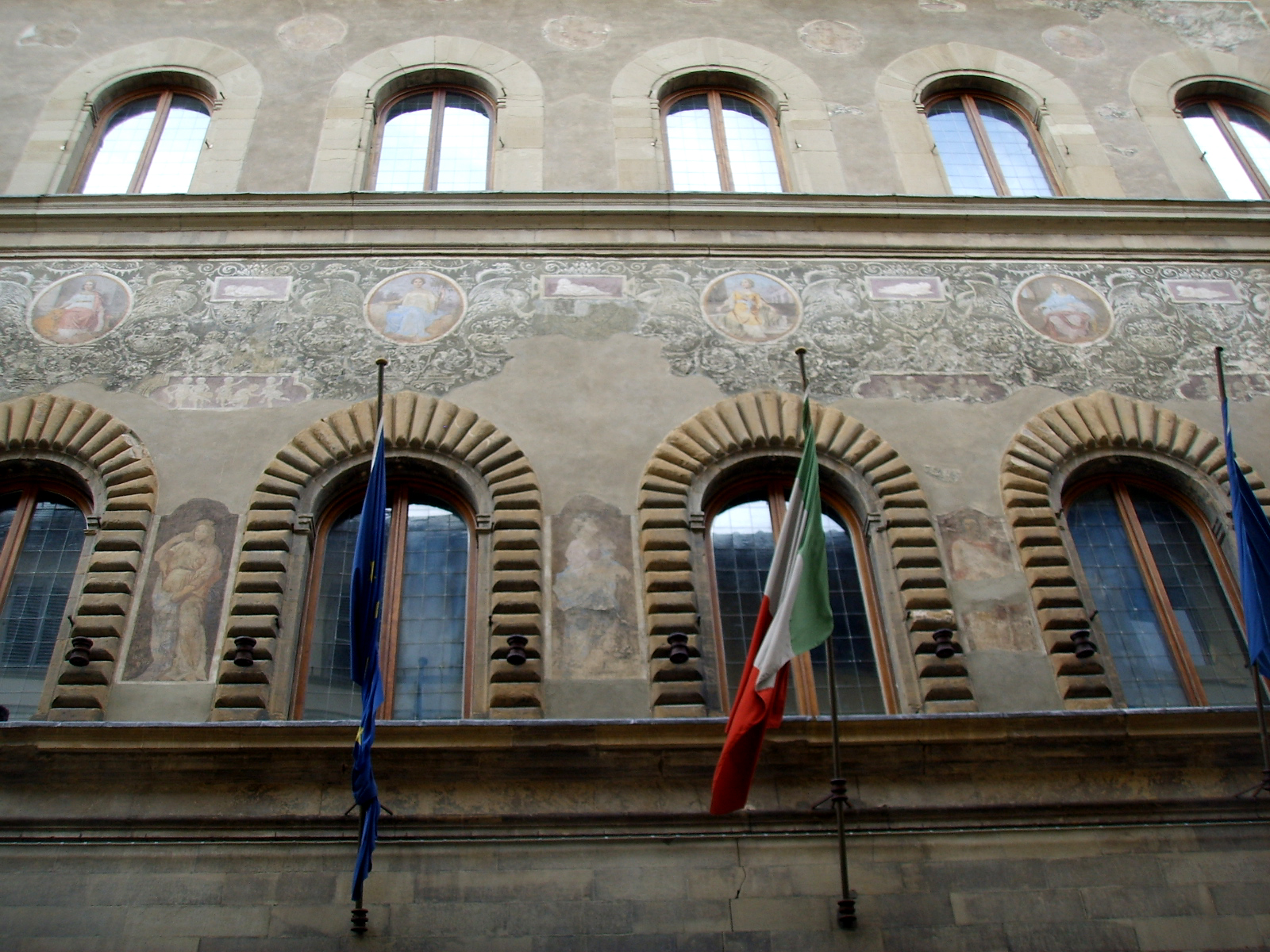 Palazzo_Niccolini in Florence